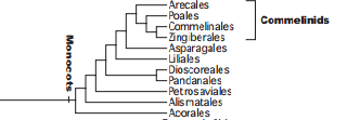 cladograma Monocotiledoneas